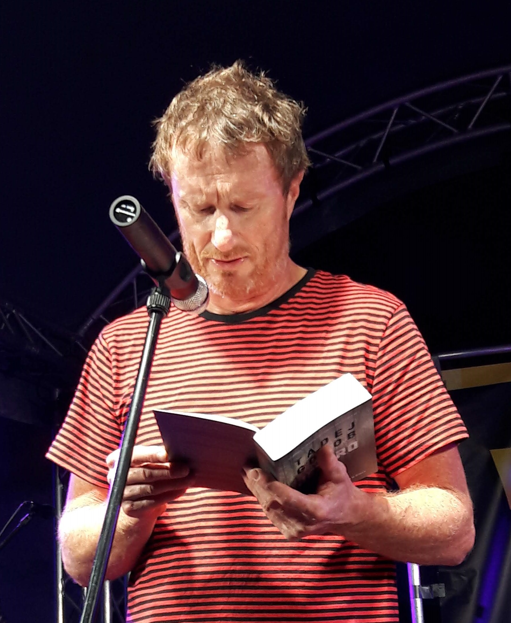 Tadej Golob, slovenski pisatelj; bere odlomek iz svoje knjižne uspešnice Jezero